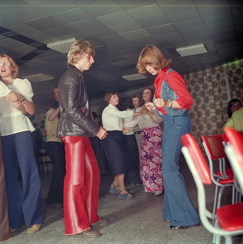 Original image description from the Deutsche Fotothek Disko